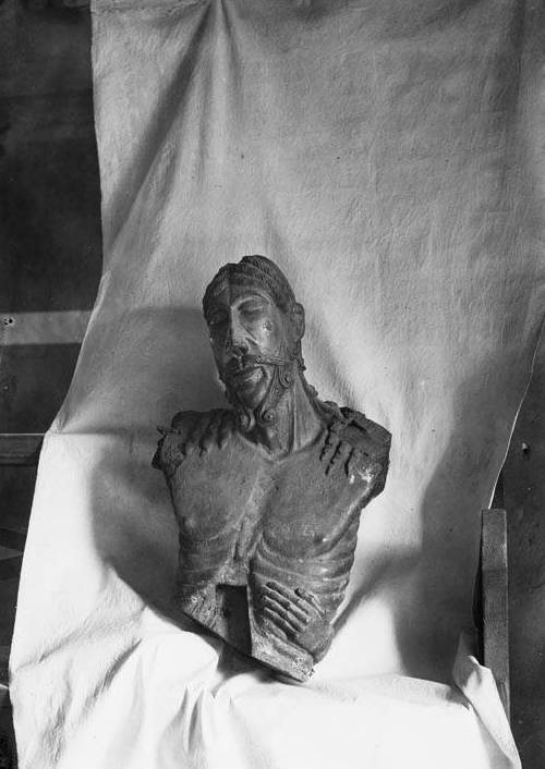 Imatge